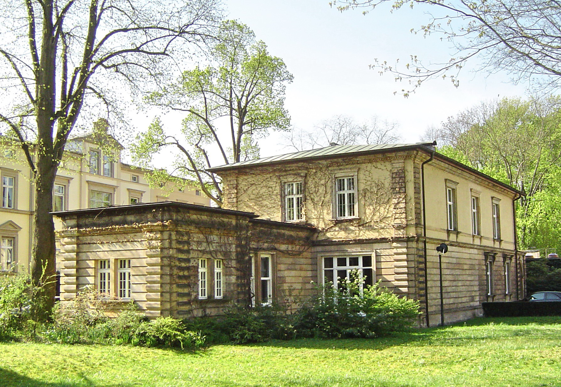 Bayreuth, Haus Wahnfried, Siegfriedhaus